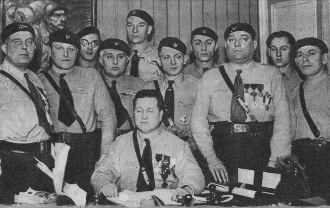 "Marcel Boucard [sic], chef des Francistes, ex-lieutenant de Hervé-la-Victoire et de Coty l'Ennemi du Peuple".